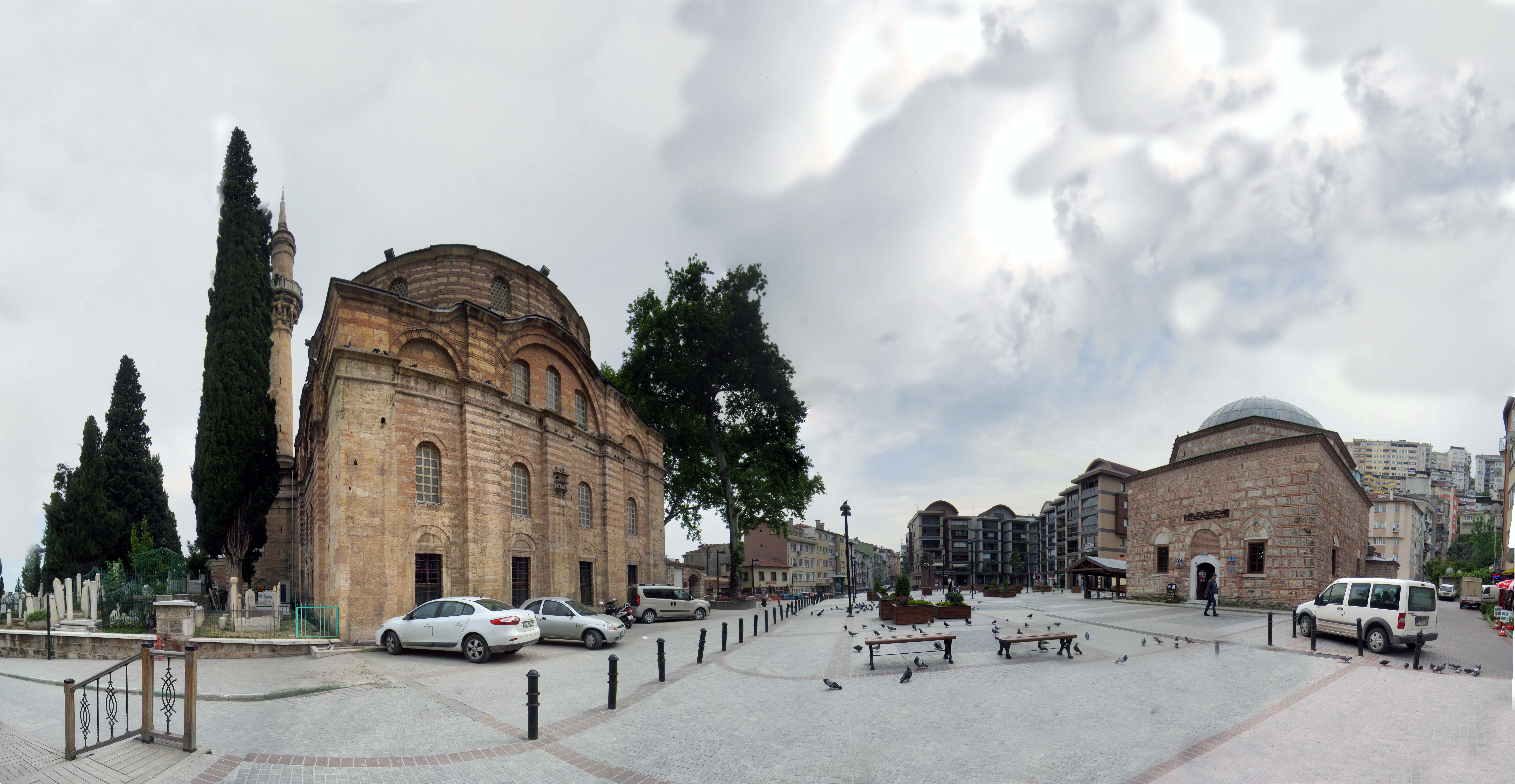 EMİRSULTAN CAMİ VE HAMAMI BURSA